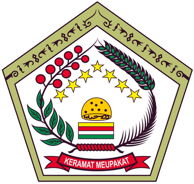 Lambang Kabupaten Aceh Tengah, Aceh, Indonesia